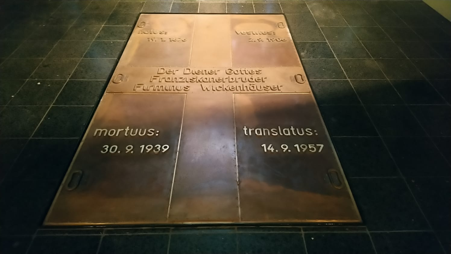 Grabplatte des Franziskaners Firminus Wickenhäuser in Maria Empfängnis in Düsseldorf